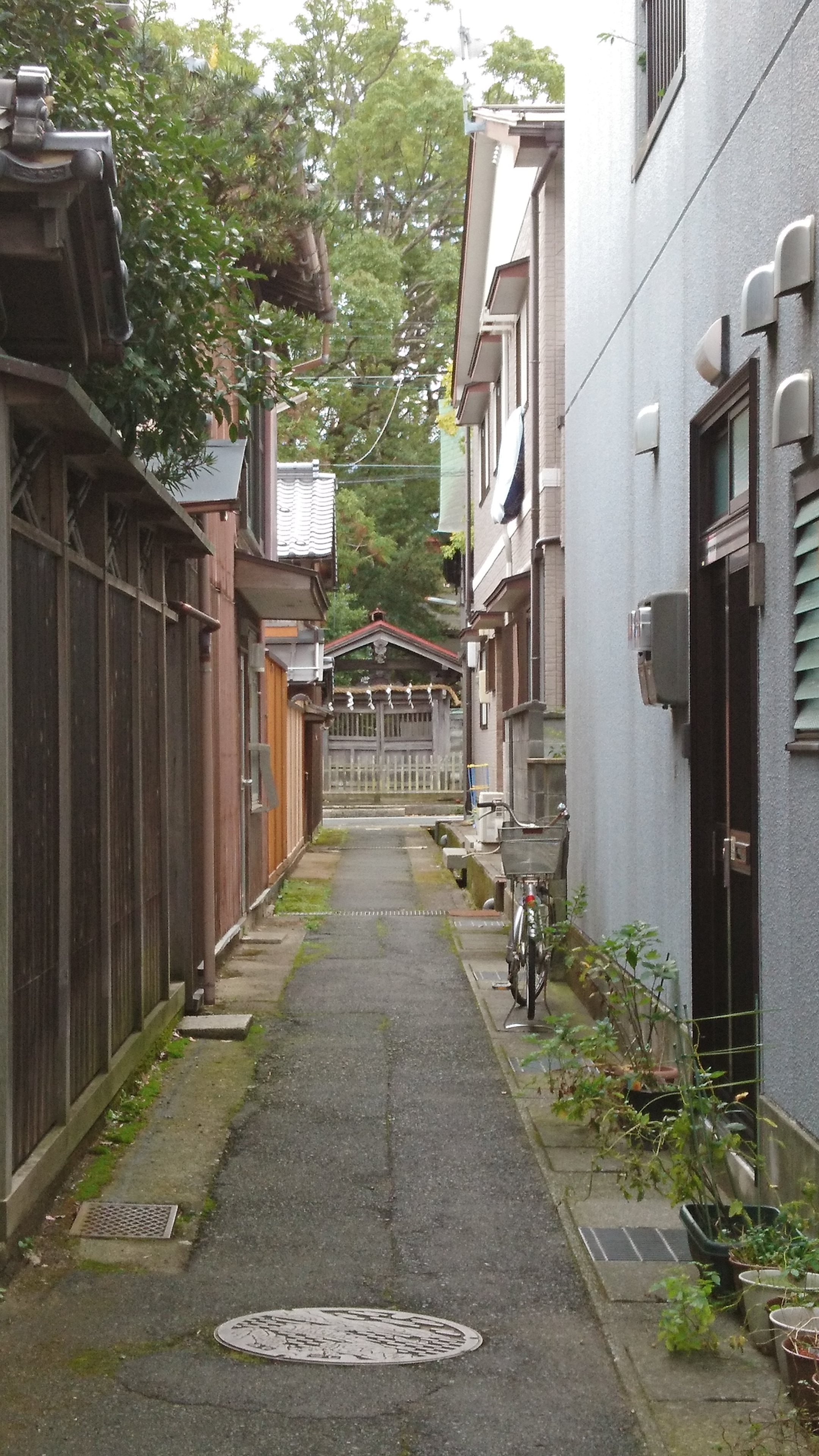 和貴宮神社の裏から海へまっすぐ通じる勘左衛門小路。漁師の勘左衛門が細川氏より拝領したと伝えられる。